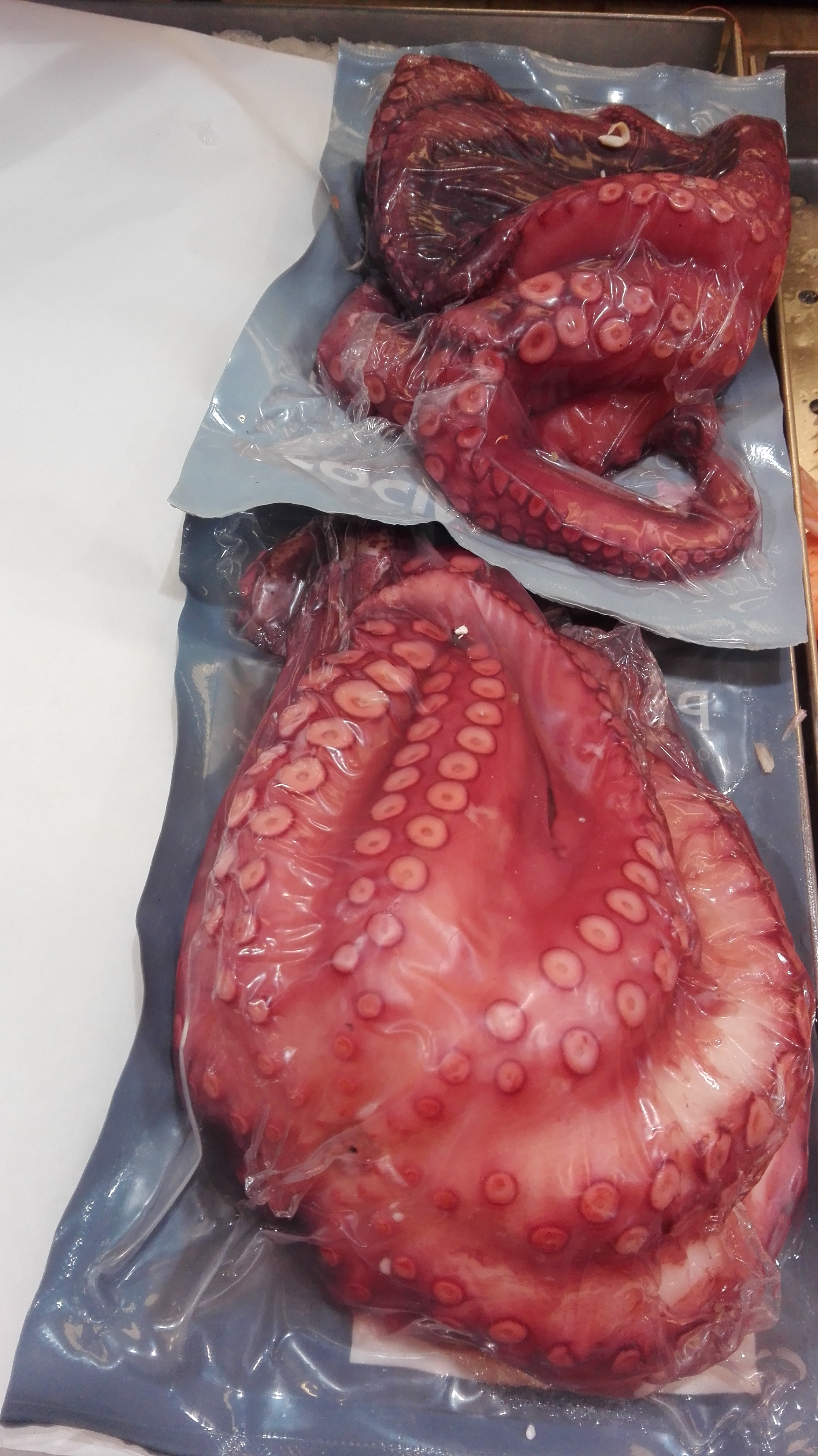 مأكولات بحرية